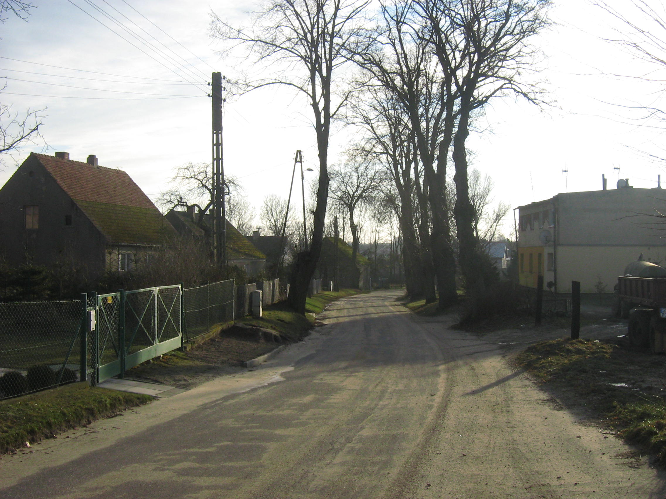 Trzebieszewo - droga przez wieś